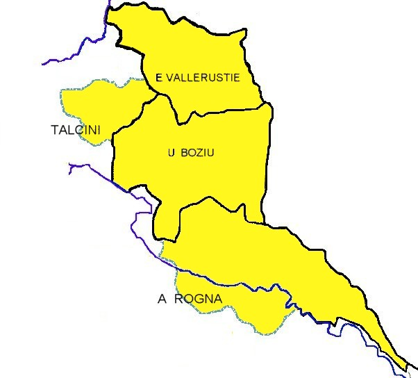 Canton de Bustanico, Castagniccia, Corse. Composition du canton avec quatre microrégions : pieve di E Vallerustie, pieve di U Boziu, pieve di A Rogna, pieve di Tàlcini.